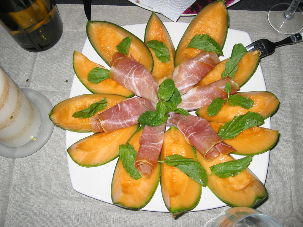 Melon jambon cru d'Elise